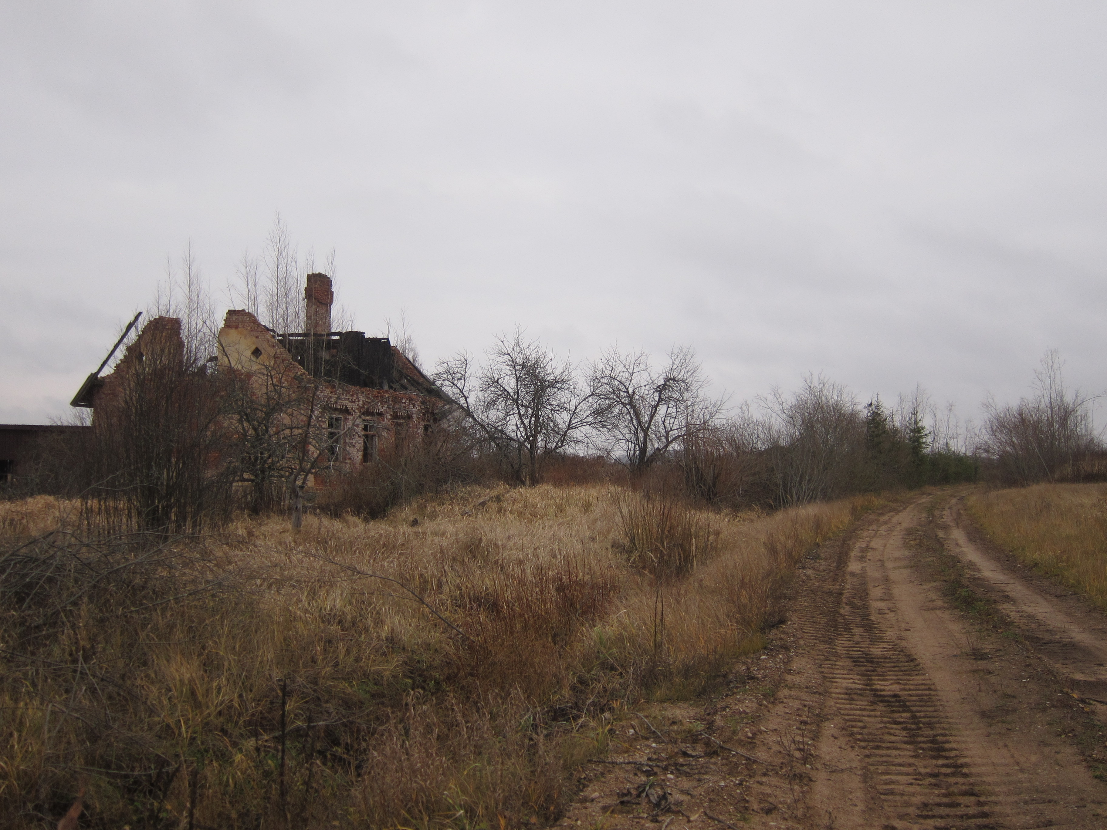 Galgauskas stacijas atrašanās vieta. Pa kreisi bijusī dzelzceļnieku māja